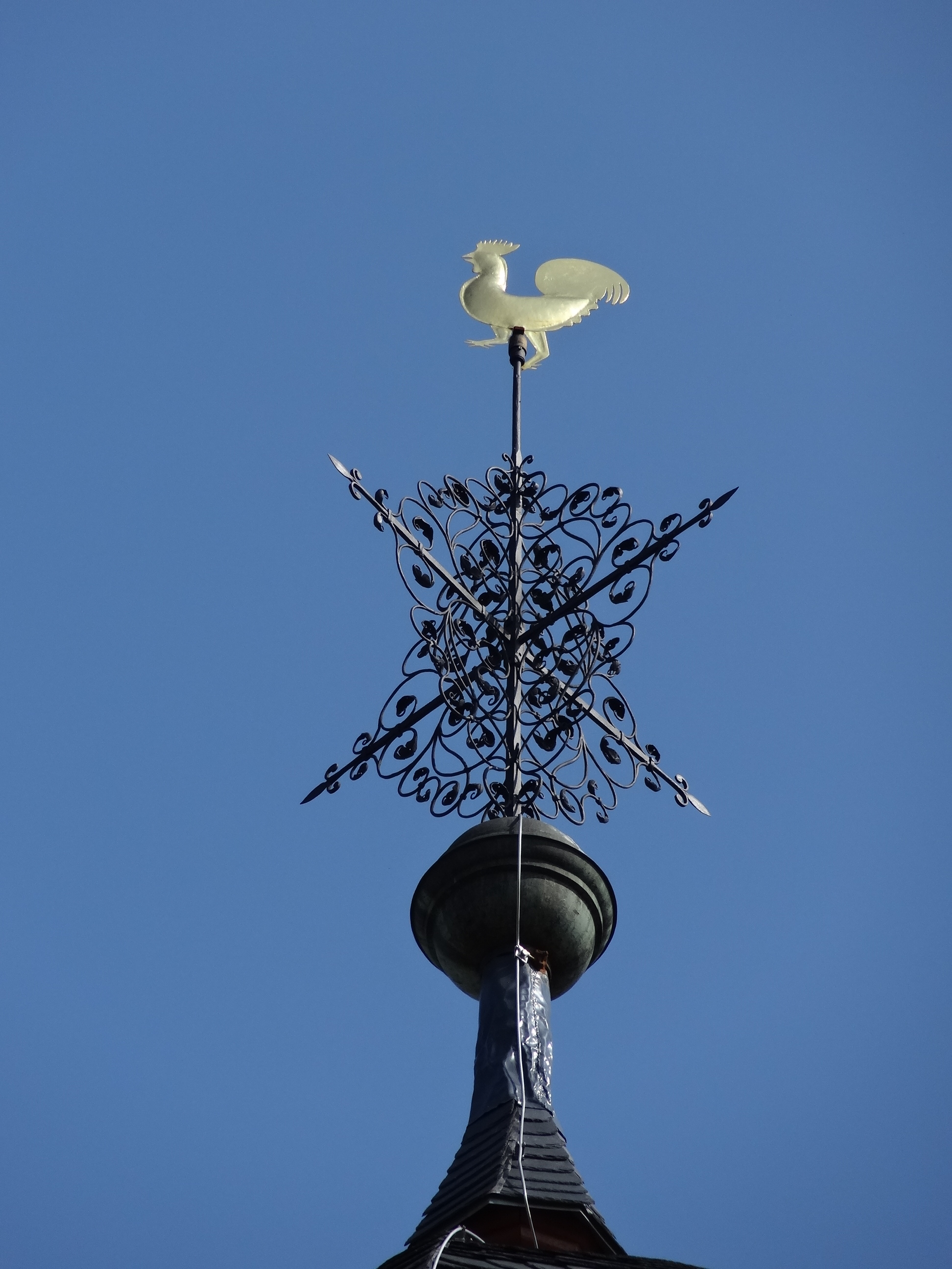 Evangelische Kirche Trais-Horloff